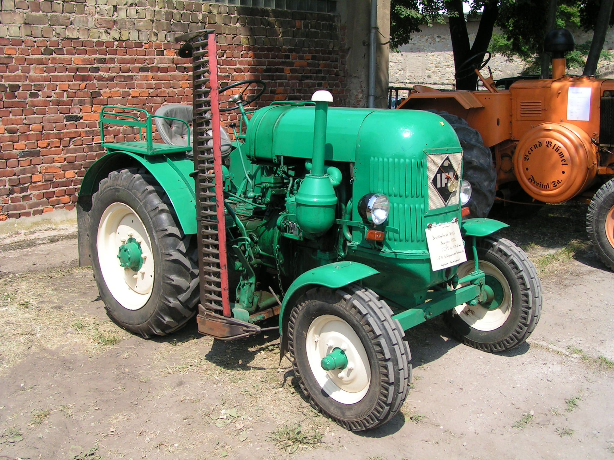 IFA-Traktor RS02 in Dresden Roßthal, Schulfest 2010